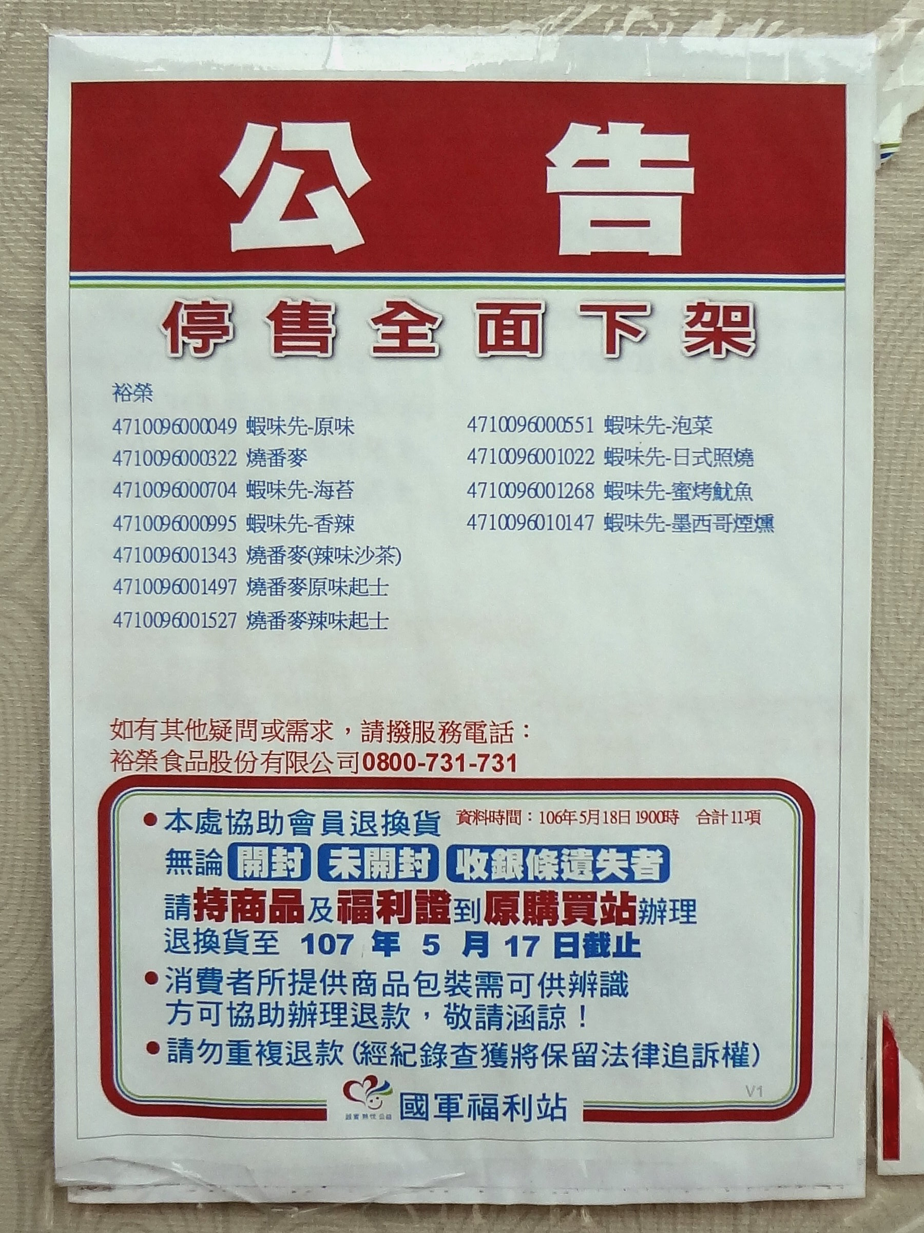 中華民國國防部福利事業管理處板橋福利站大門左方公布欄，公告裕榮食品產品停售及全面下架。